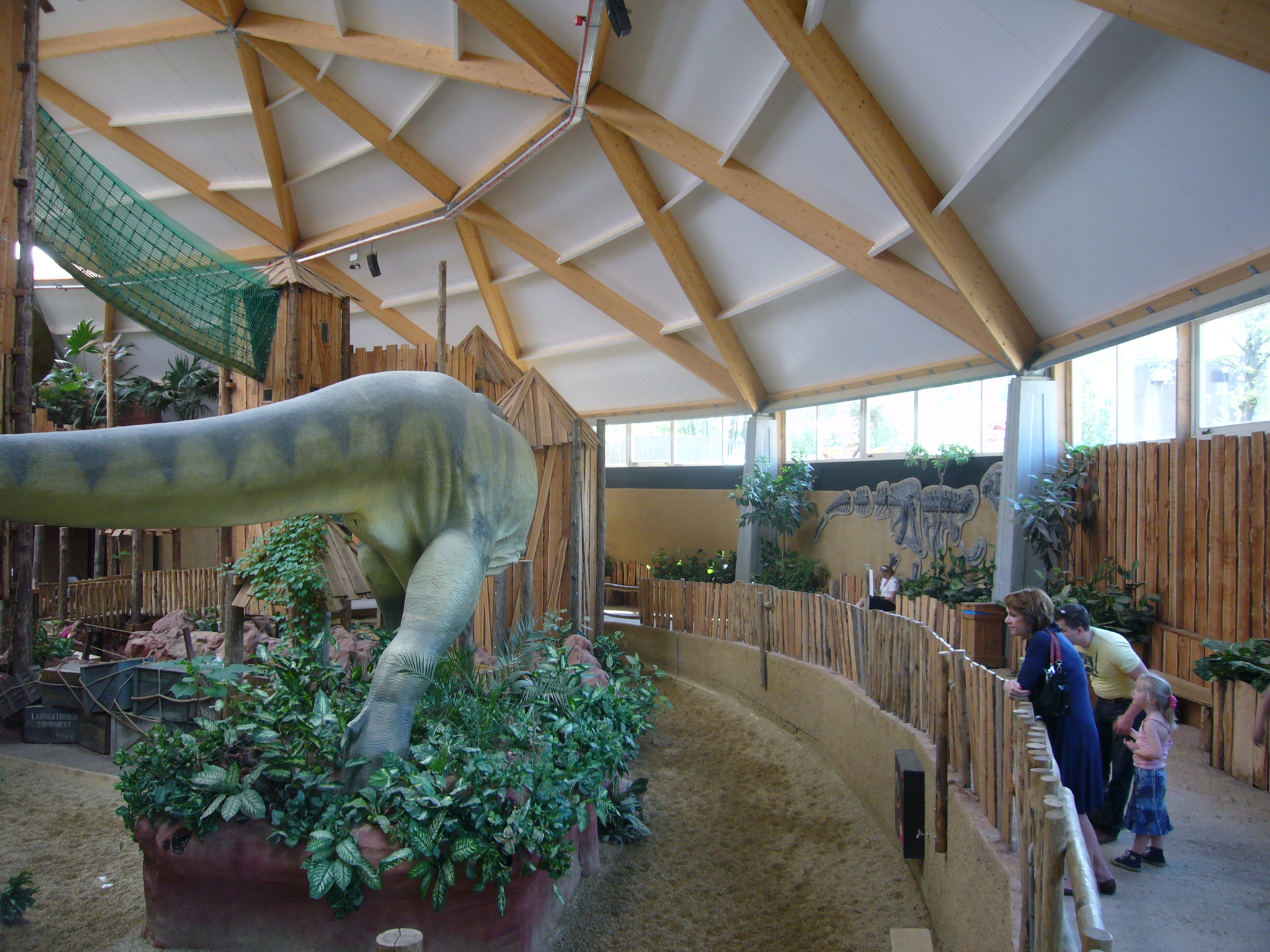 De Dinodome in GaiaZoo te Kerkrade is een grote speelhal voor kinderen met een geodetische koepelconstructie in hout van 56m.